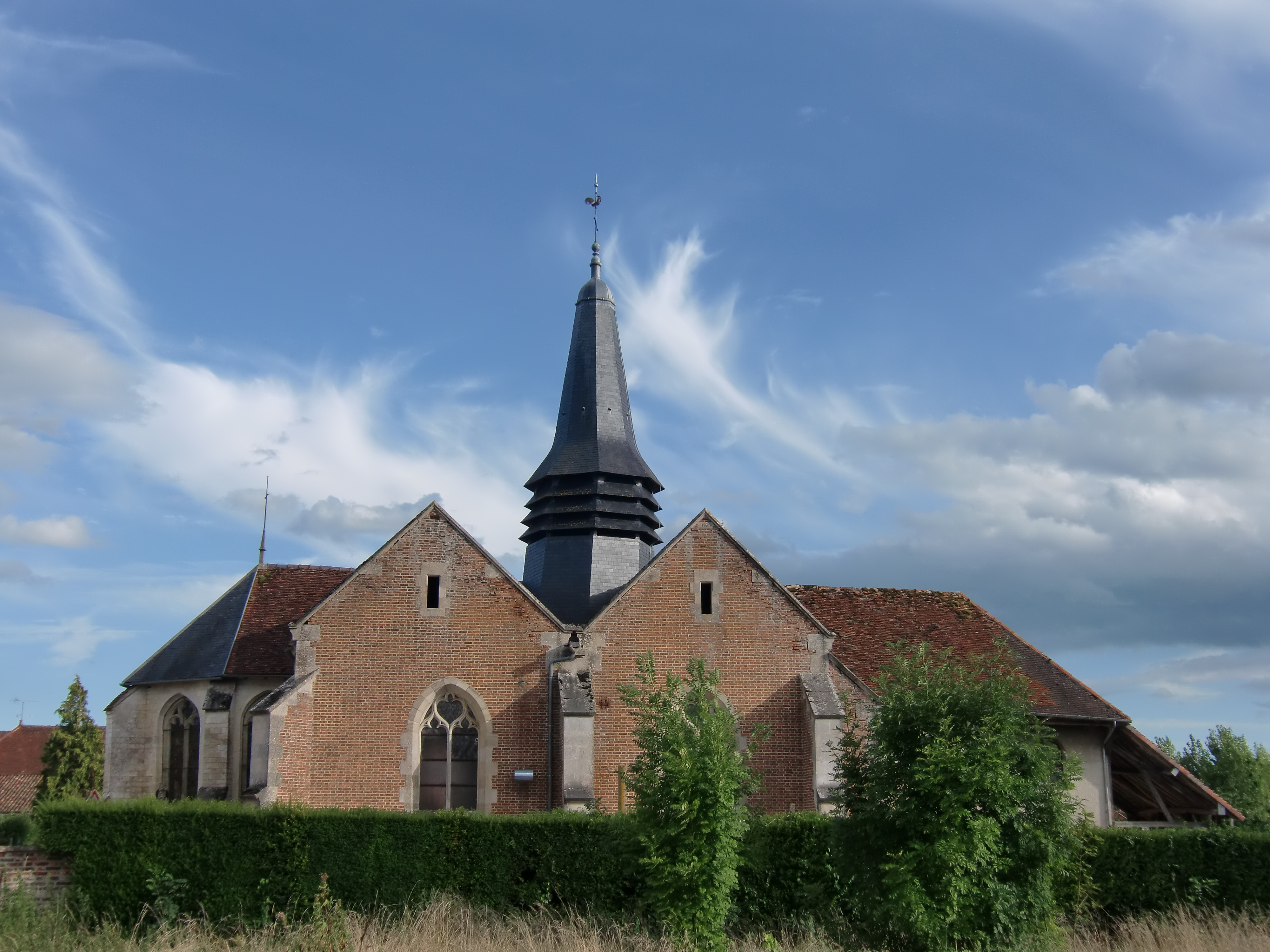 Eglise de Précy-Saint-Martin (Aube - Champagne - France)